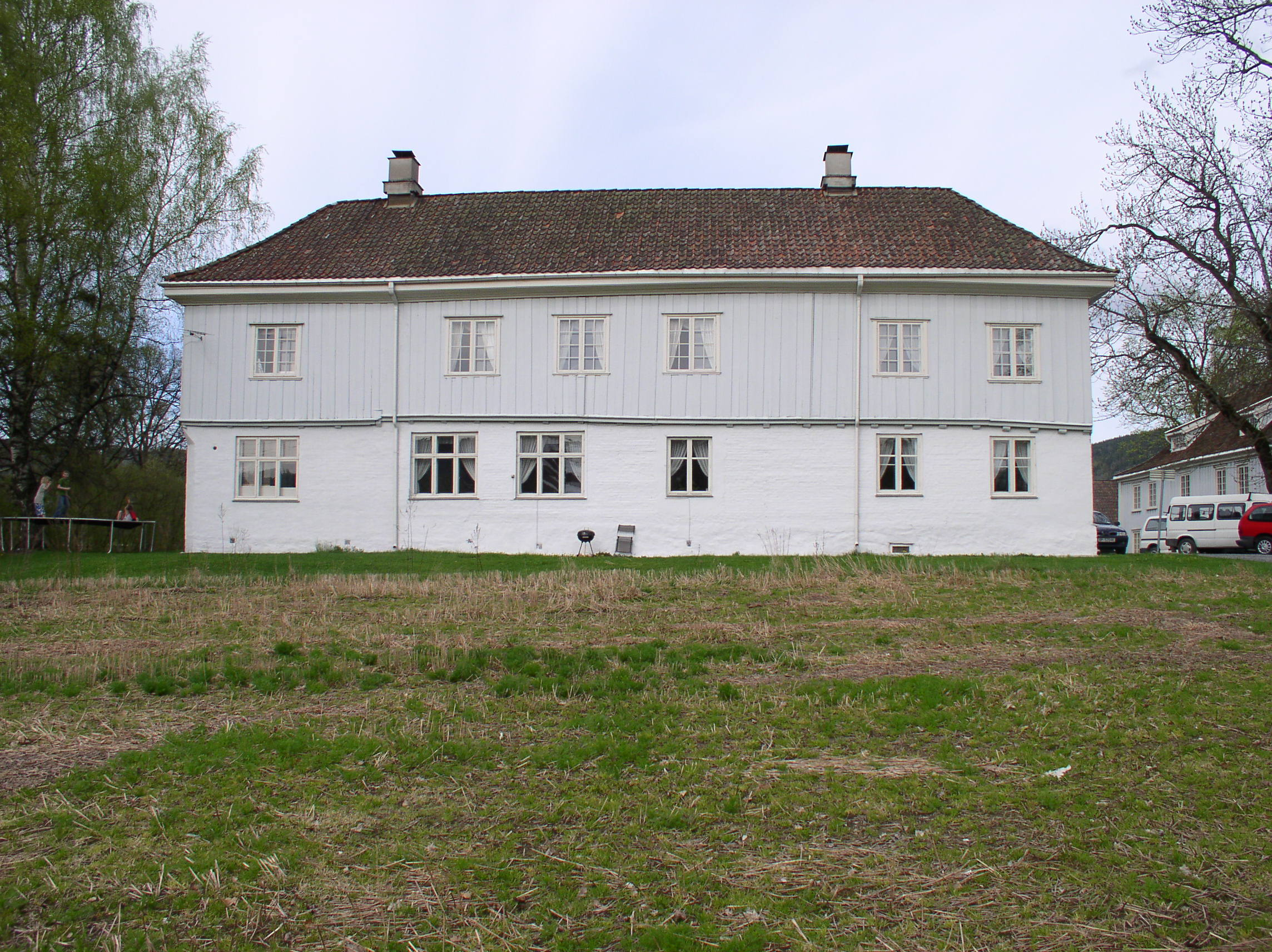 Hovedbygningen på Wøyen gård.